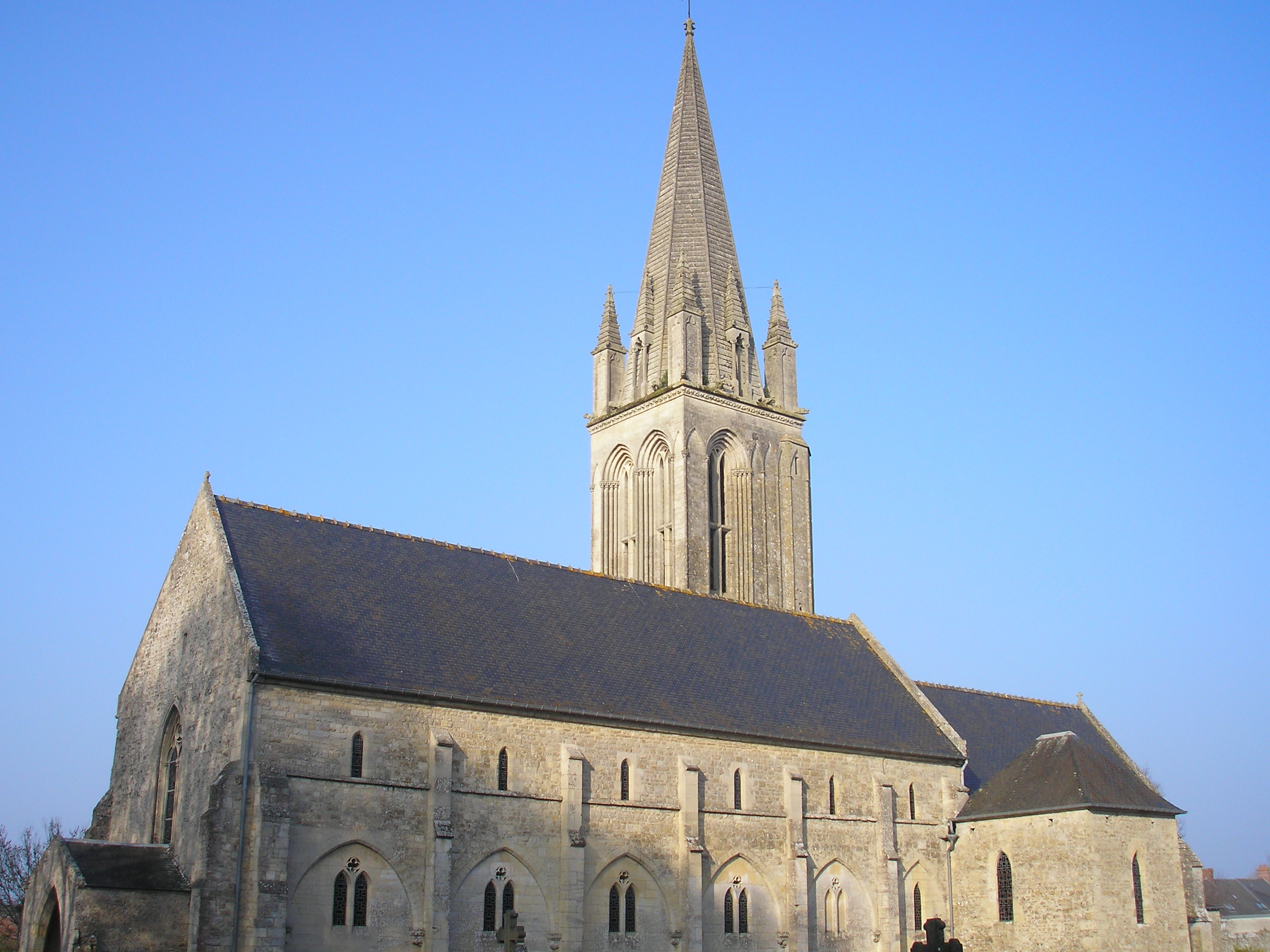 Vierville-sur-Mer (Normandie, France). L'église Saint-André.